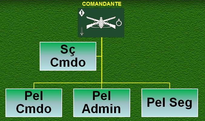 Estrutura da Cia C 1ª DE